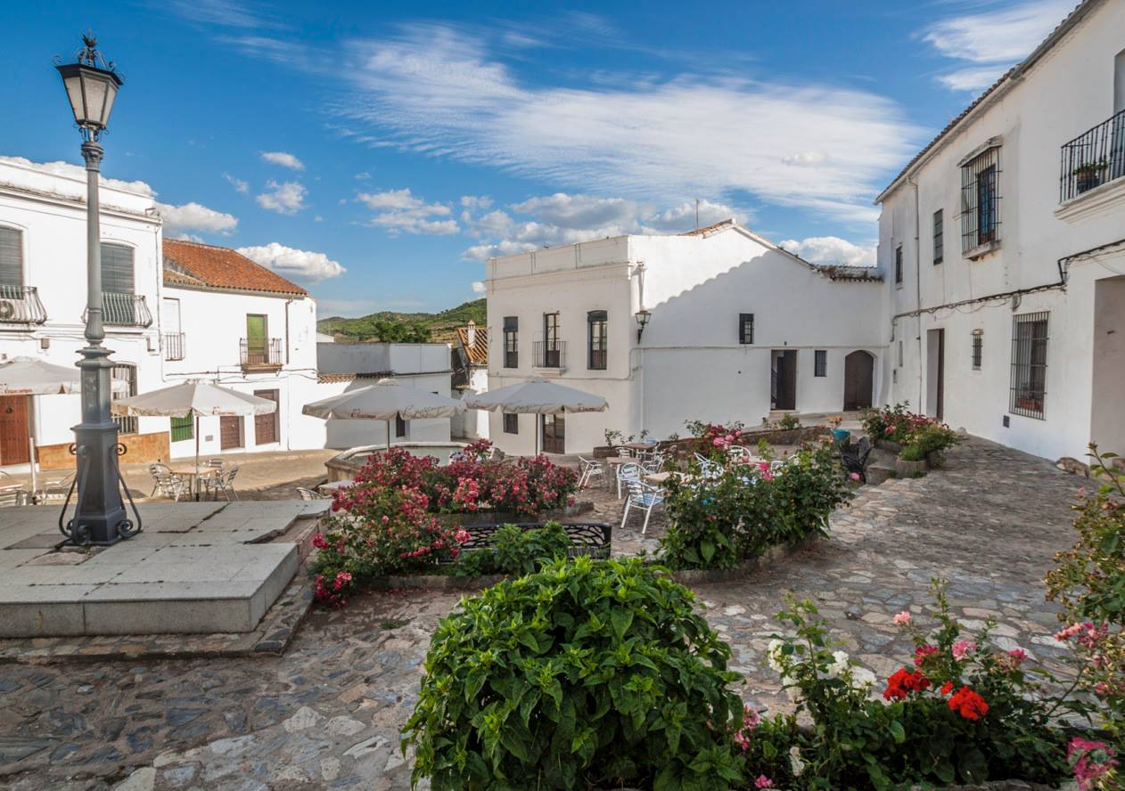 plaza del consejo, Cazalla de la sierra